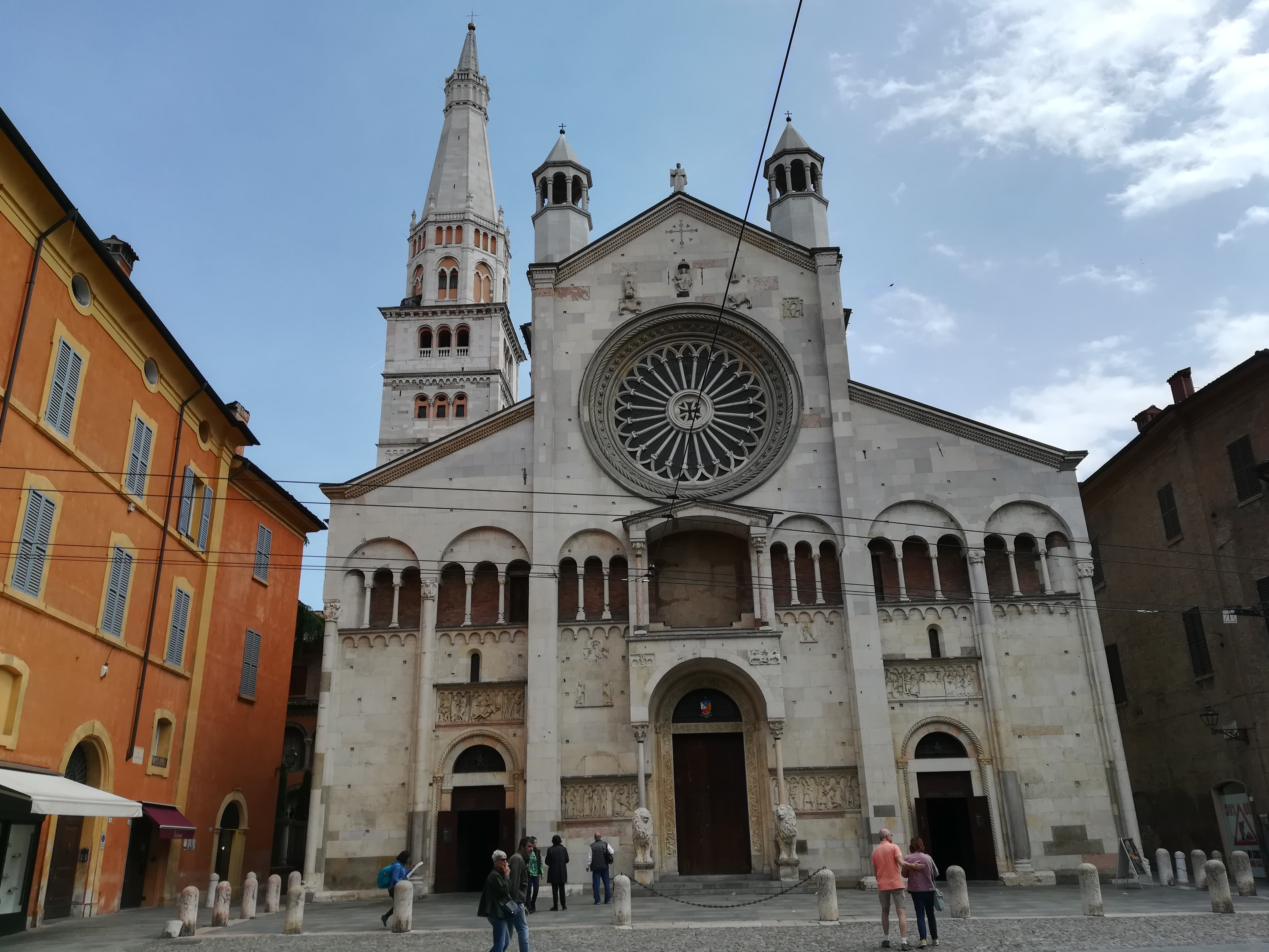 Modena